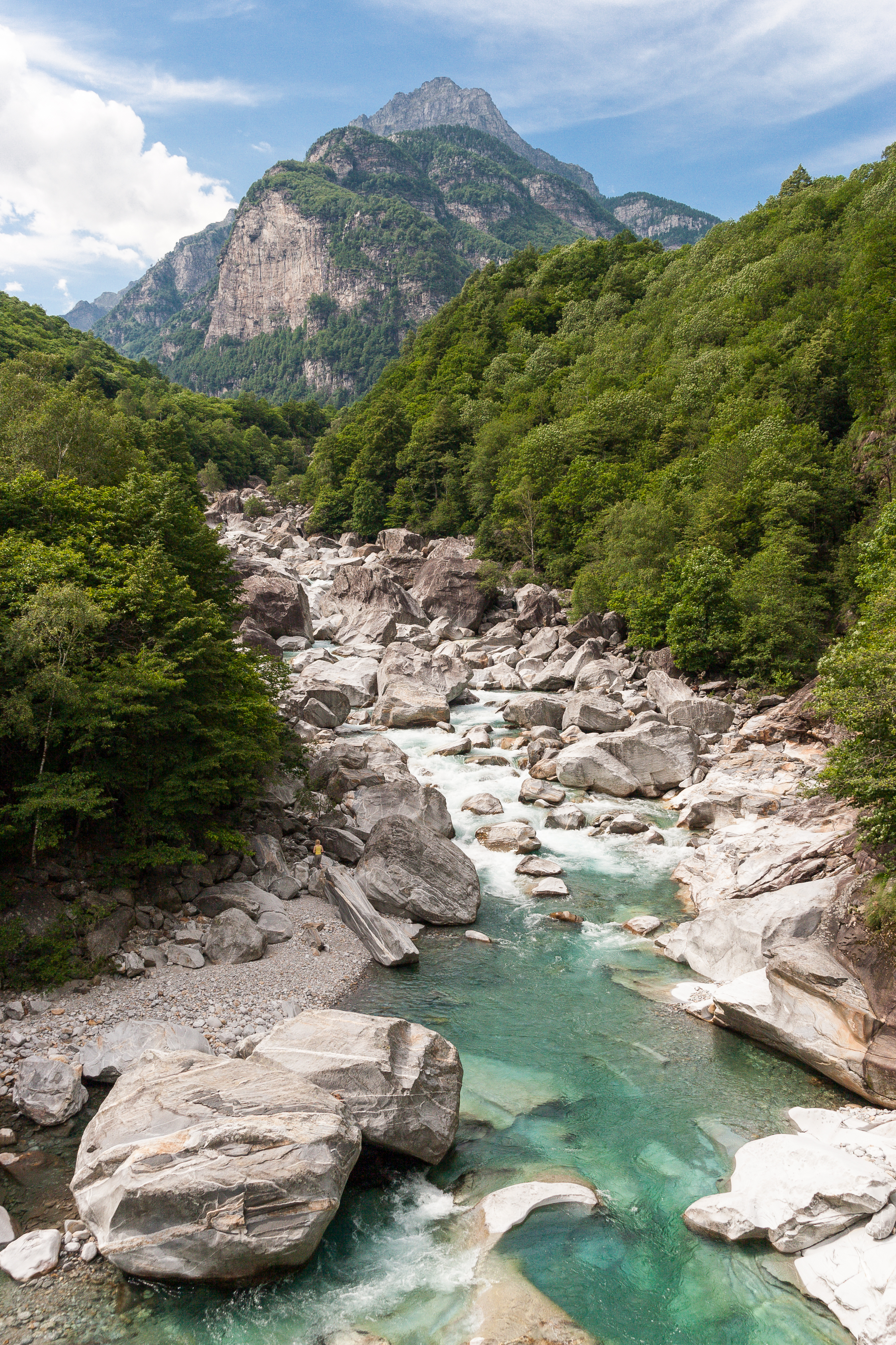 Im Verzascatal, vermutlich in der Nähe von Ponte Verzasca.